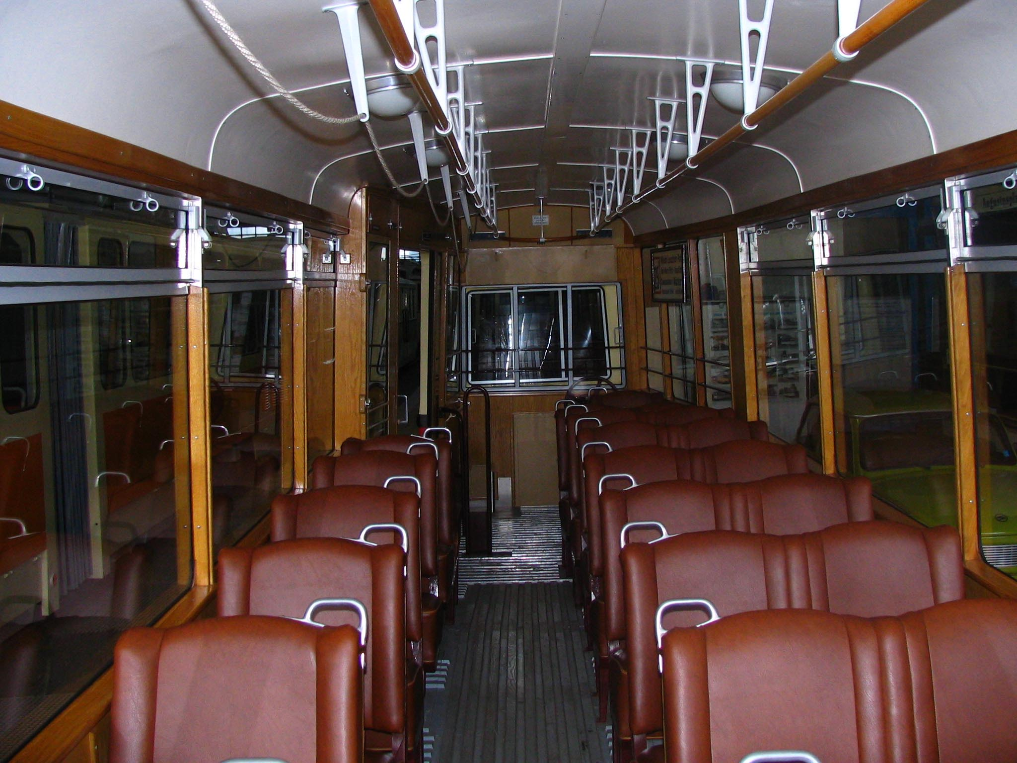 Triebwagen Typ 30 von innen. Das Seil oben/links dient zur Betätigung einer Glocke. (Historischer Straßenbahnhof Leipzig-Möckern)